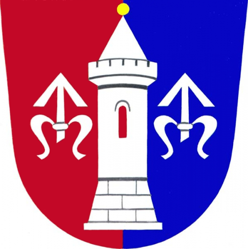 Znak obce Hustopeče nad Bečvou